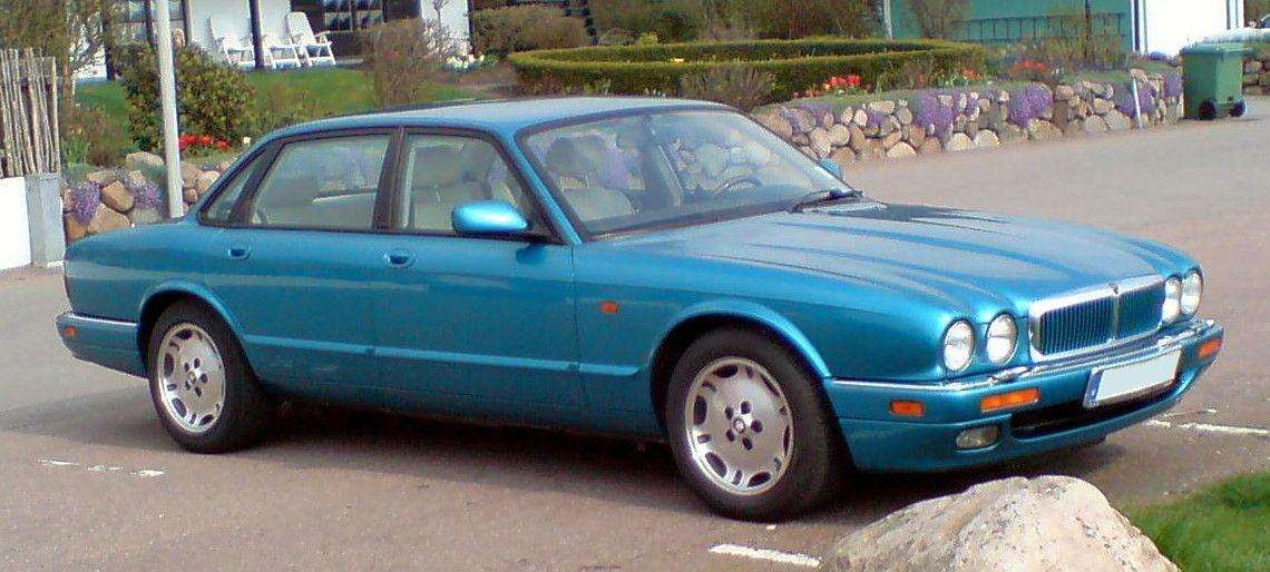 Jaguar XJ Sport (1995) in turquoise paint, parked in Viken, Sweden.